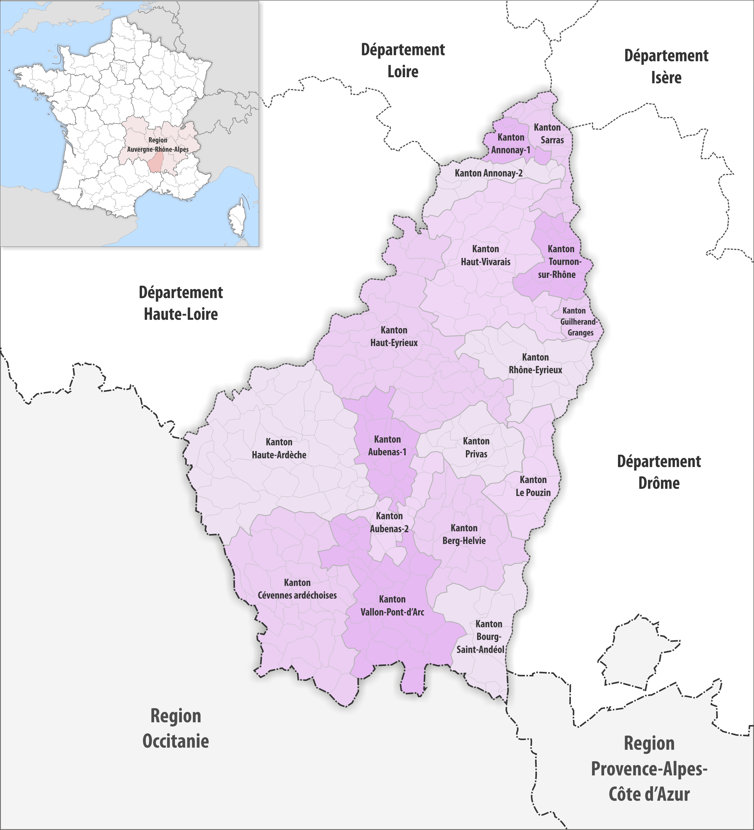 Gemeinden und Kantone im Departement Ardèche